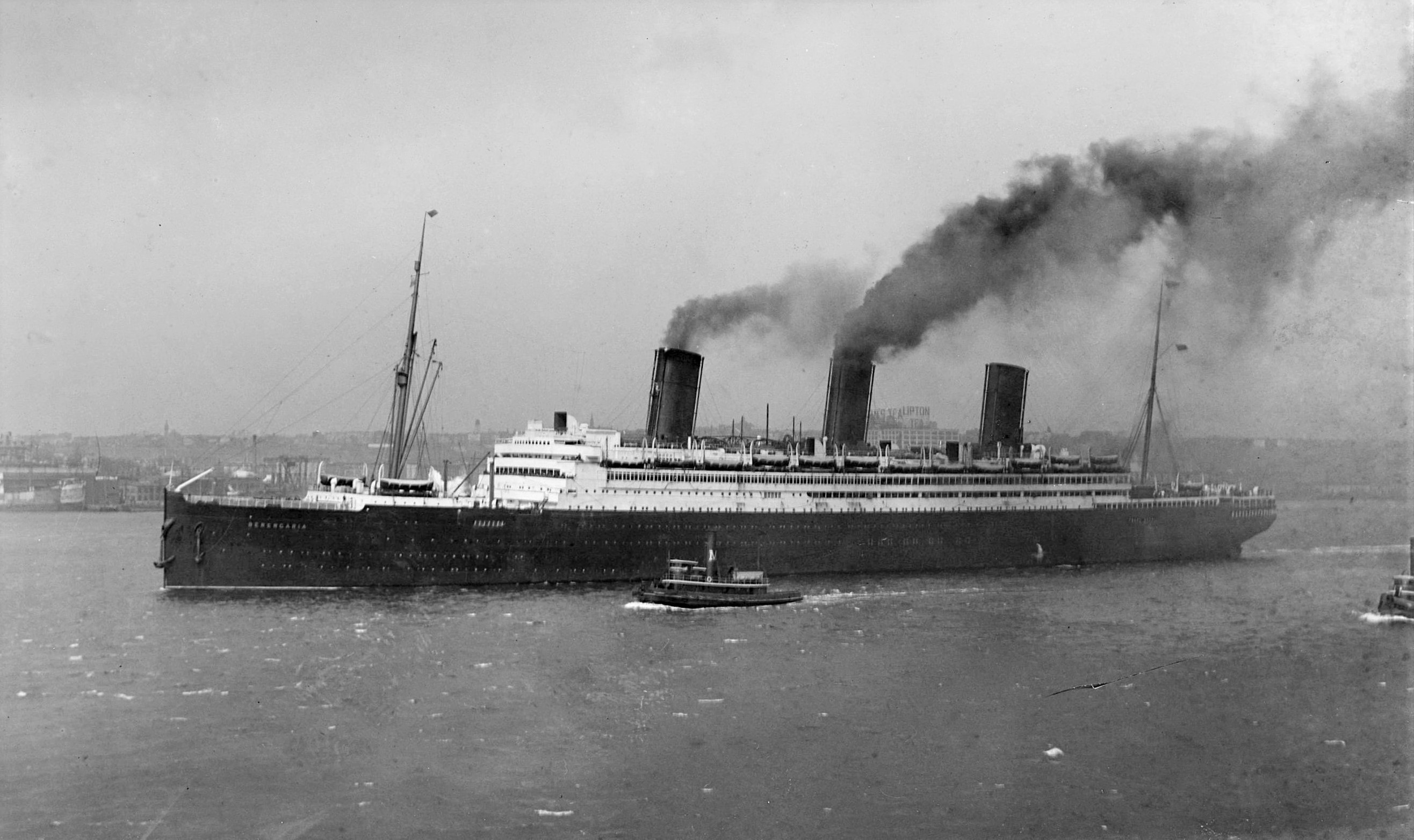 RMS Berengaria, ocean liner